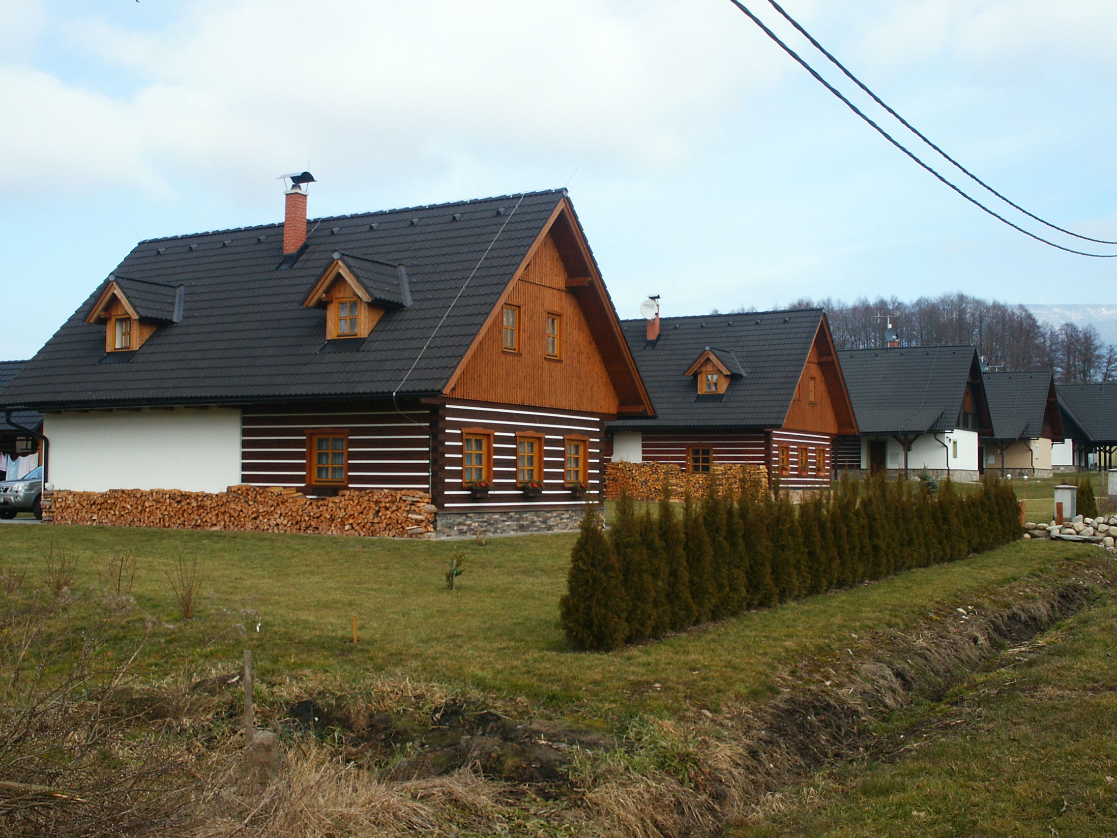 Fořt - moderní roubenky (č.p.59-61)